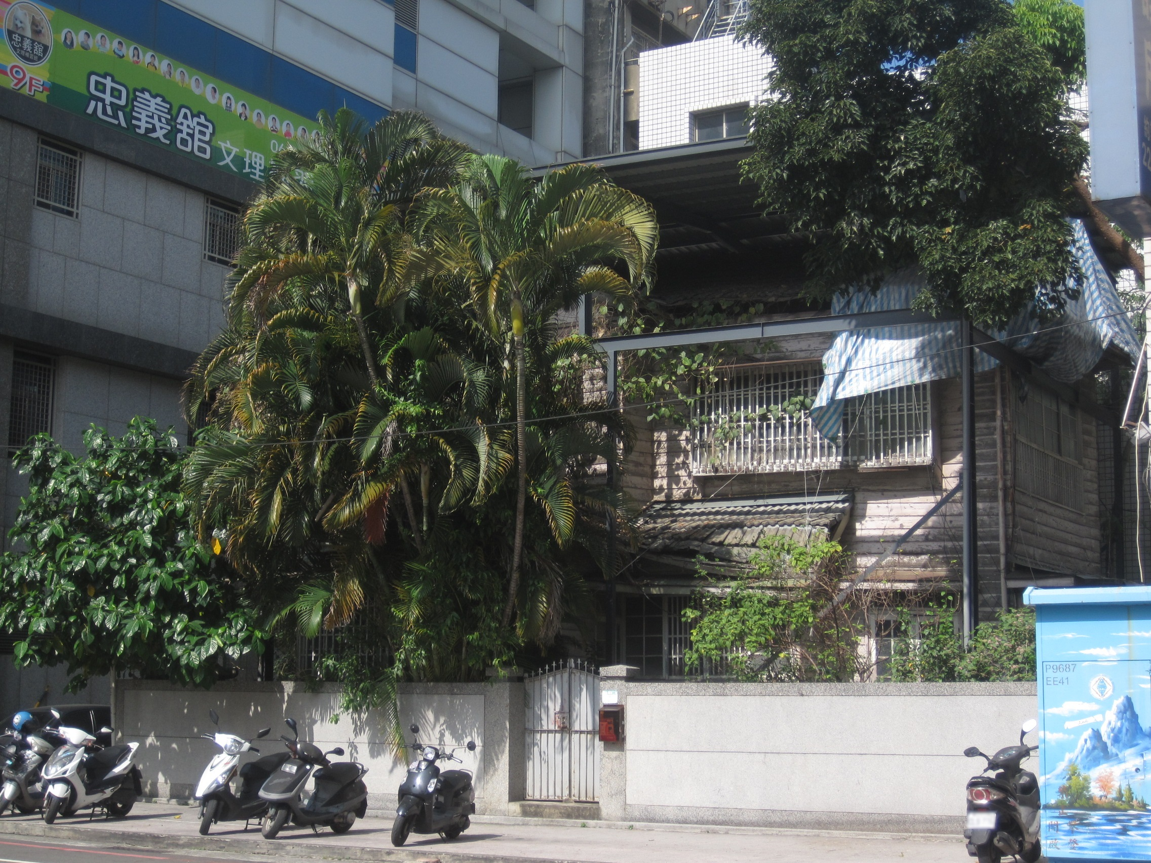 臺南永福路孫宅